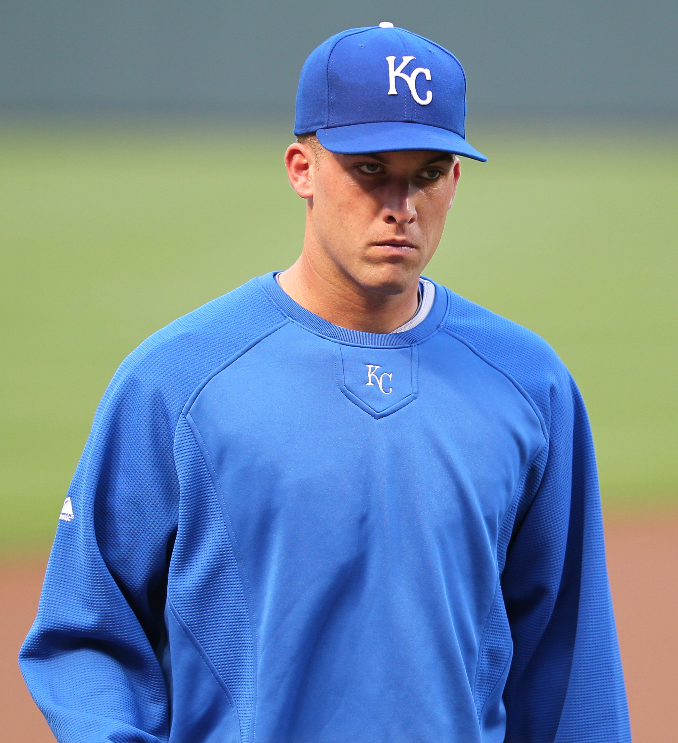 Danny Duffy